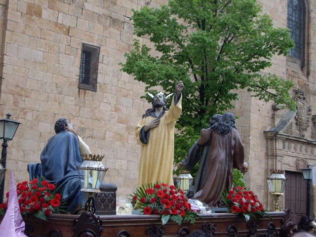 Paso de Jesús ante Pilatos, obra de Francisco González Macías. Salamanca (España)